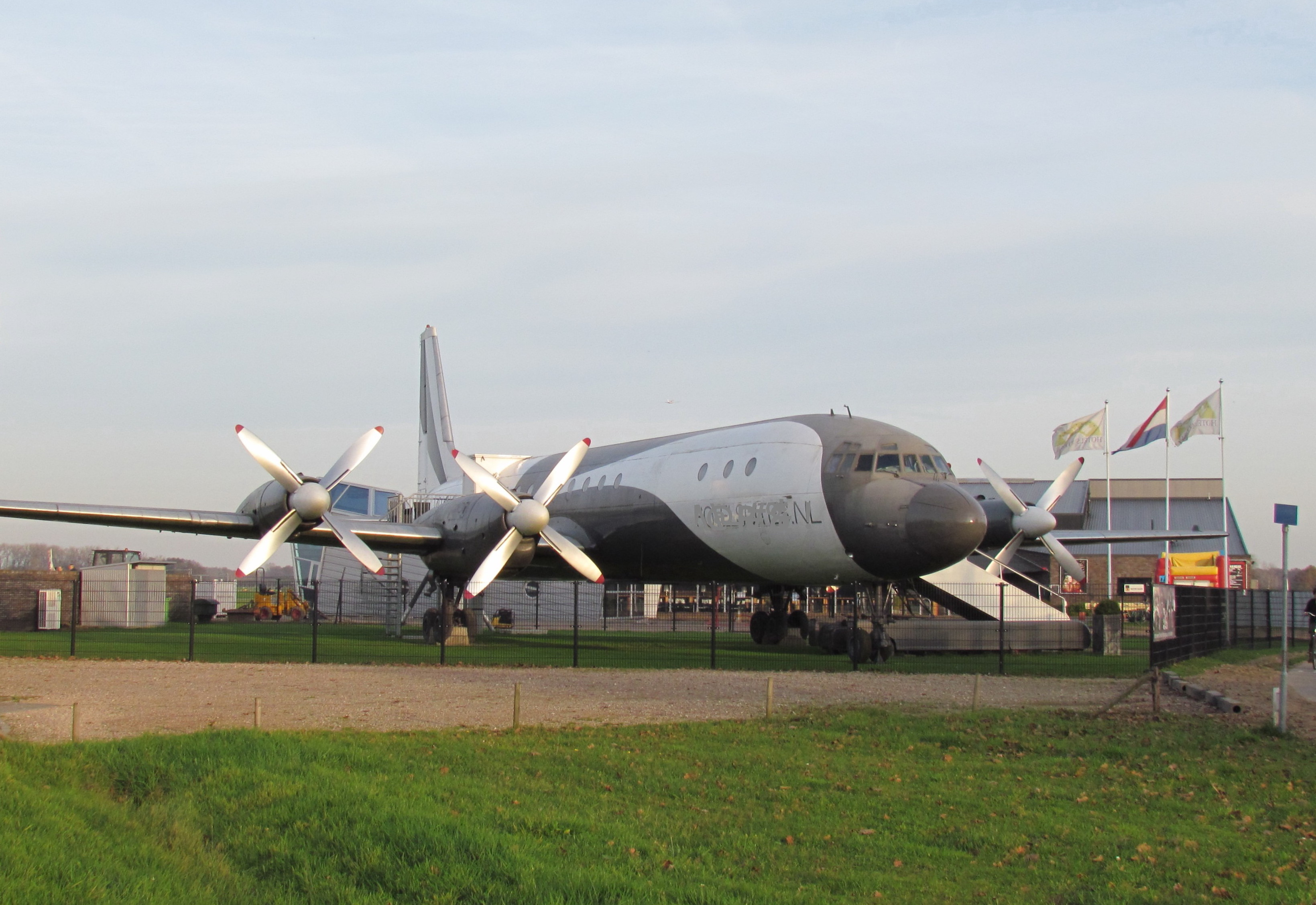 Ilyushin Il-18V, voormalige DDR-STD van Interflug (diensttoestel van Erich Honecker), tegenwoordig een hotel op Teuge International Airport